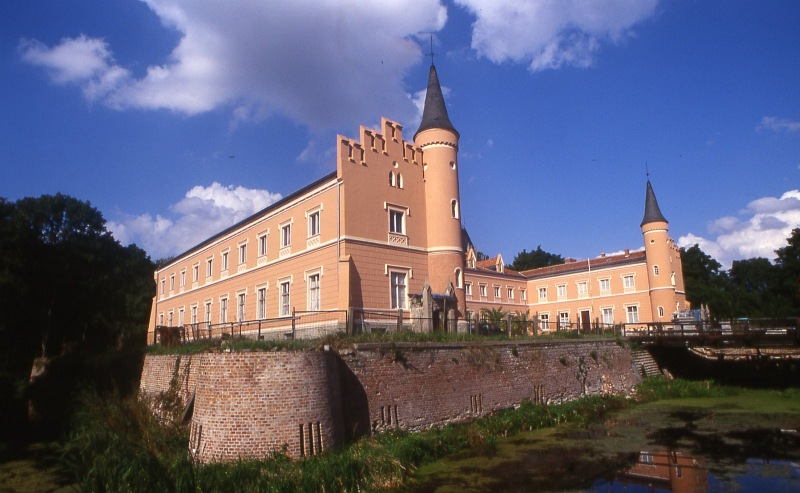 Original image description from the Deutsche Fotothek Schloss Gusow im Oderbruch